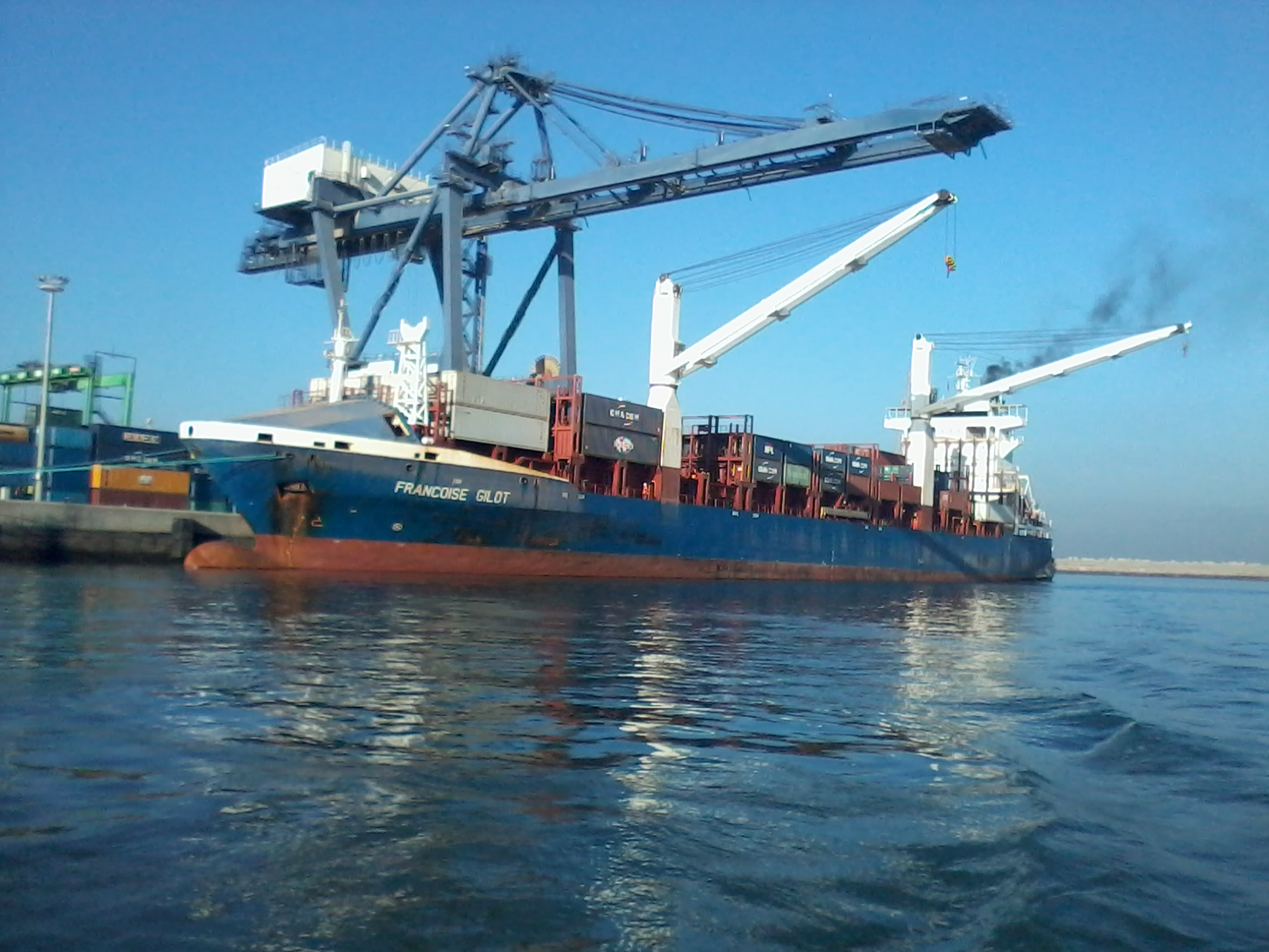 Navire FRANCOISE GILOT à quai à Casablanca . Casablanca - Morocco - IMO: 9295517 Pavillon: Antigua Barbuda Genre du navire: Cargo Année de Construction: 2005